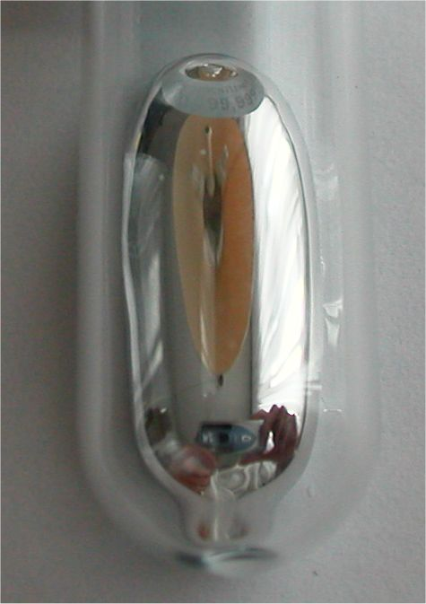 mercury element Bildbeschreibung: Quecksilber Quelle: selbst fotografiert Fotograf/Zeichner: Tomihahndorf Datum: März 2006